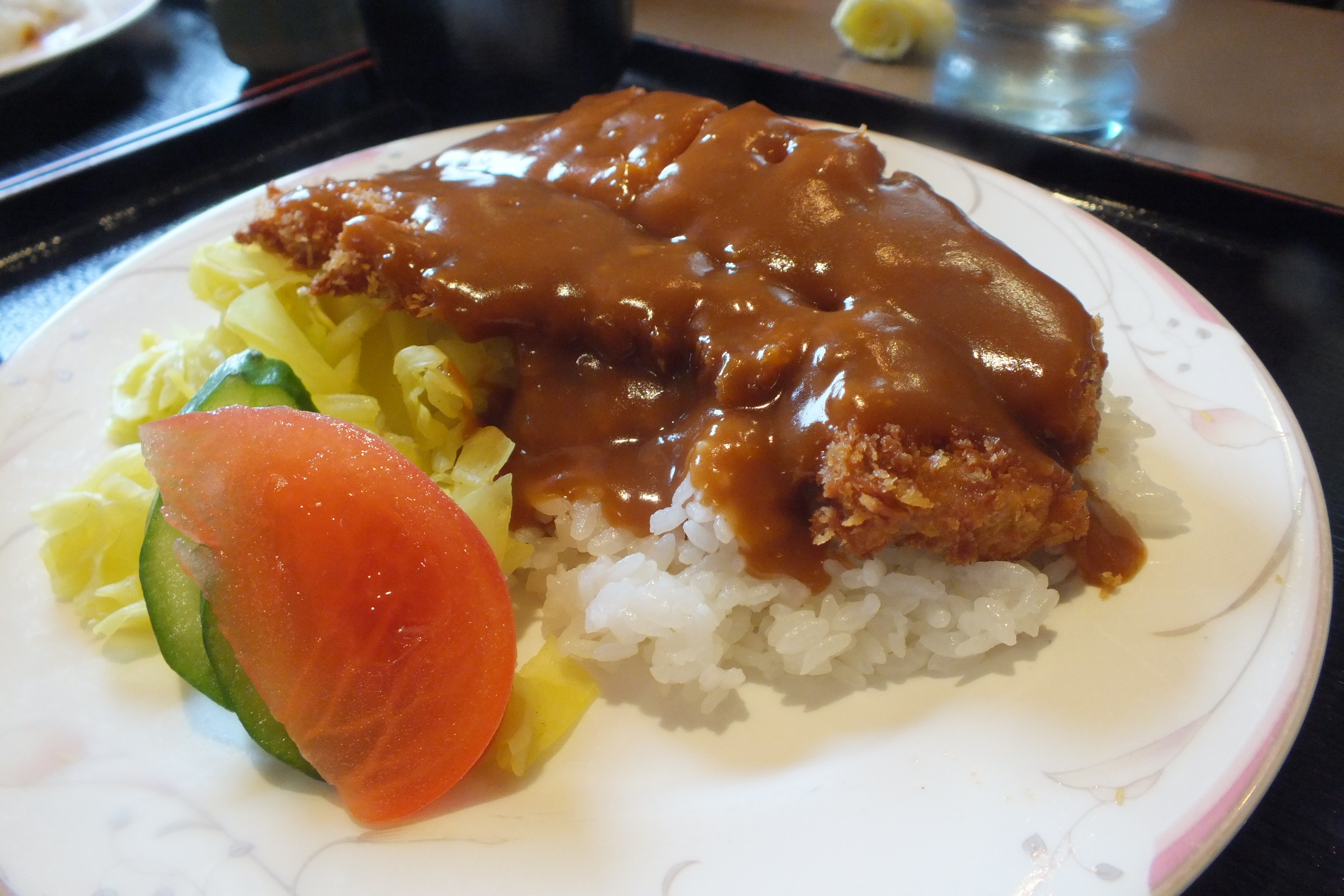 Katsu-meshi of Rocky かつめし（加古川「ロッキー」）